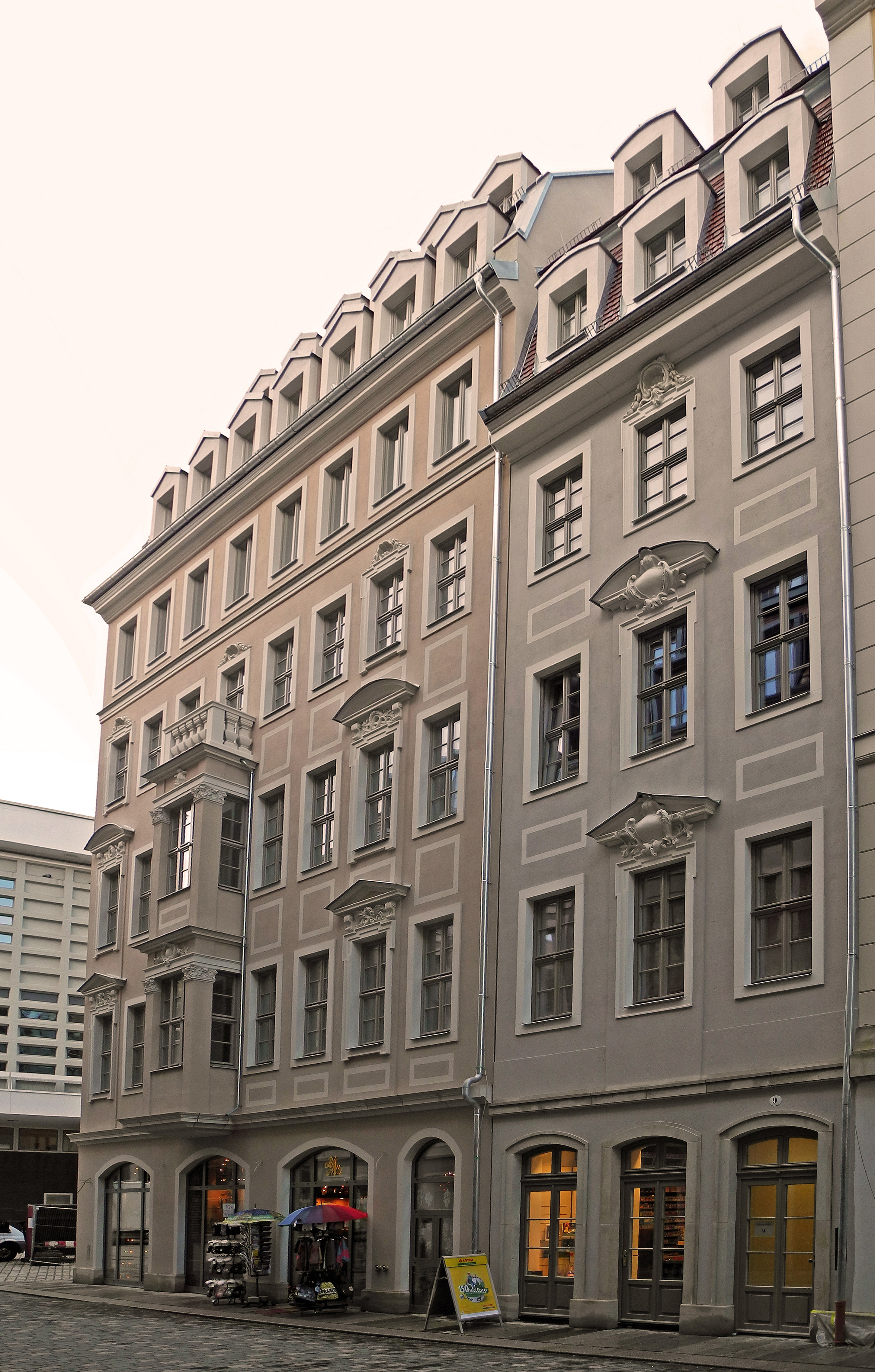 Das Chiapponische Haus (links) in Dresden, Frauenstraße 7, errichtet 1761 von Samuel Locke, 1945 zerstört und 2018 wieder aufgebaut, benannt nach der italienischen Kaufmannsfamilie Chiapponi. Der Neubau des Hauses musste links um eine Achse verkürzt werden, um die Zufahrt durch die Galeriestraße zu ermöglichen. Es war ursprünglich kein Eckhaus, siehe [1]. Rechts befindet sich das Klepperbeinsche Haus, Frauenstraße 9, seit 1911 so benannt nach der Drogerie C.G. Klepperbein.